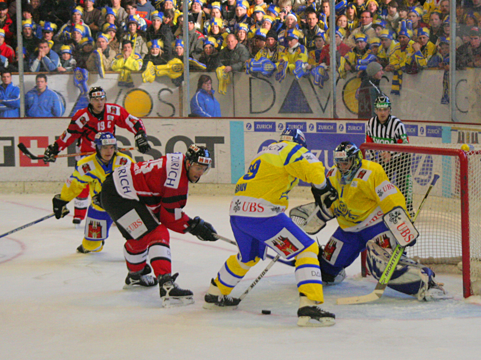 Spielsituation aus dem Spiel zwischen dem HC-Davos und Team Canada während des Spengler Cups 2006